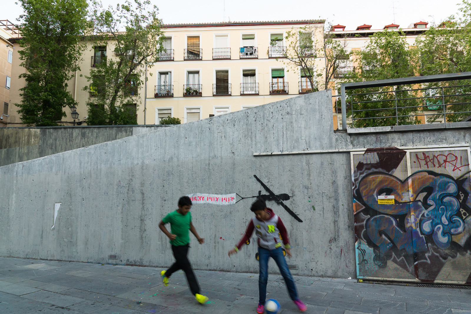 MAD - 20150418 - 85